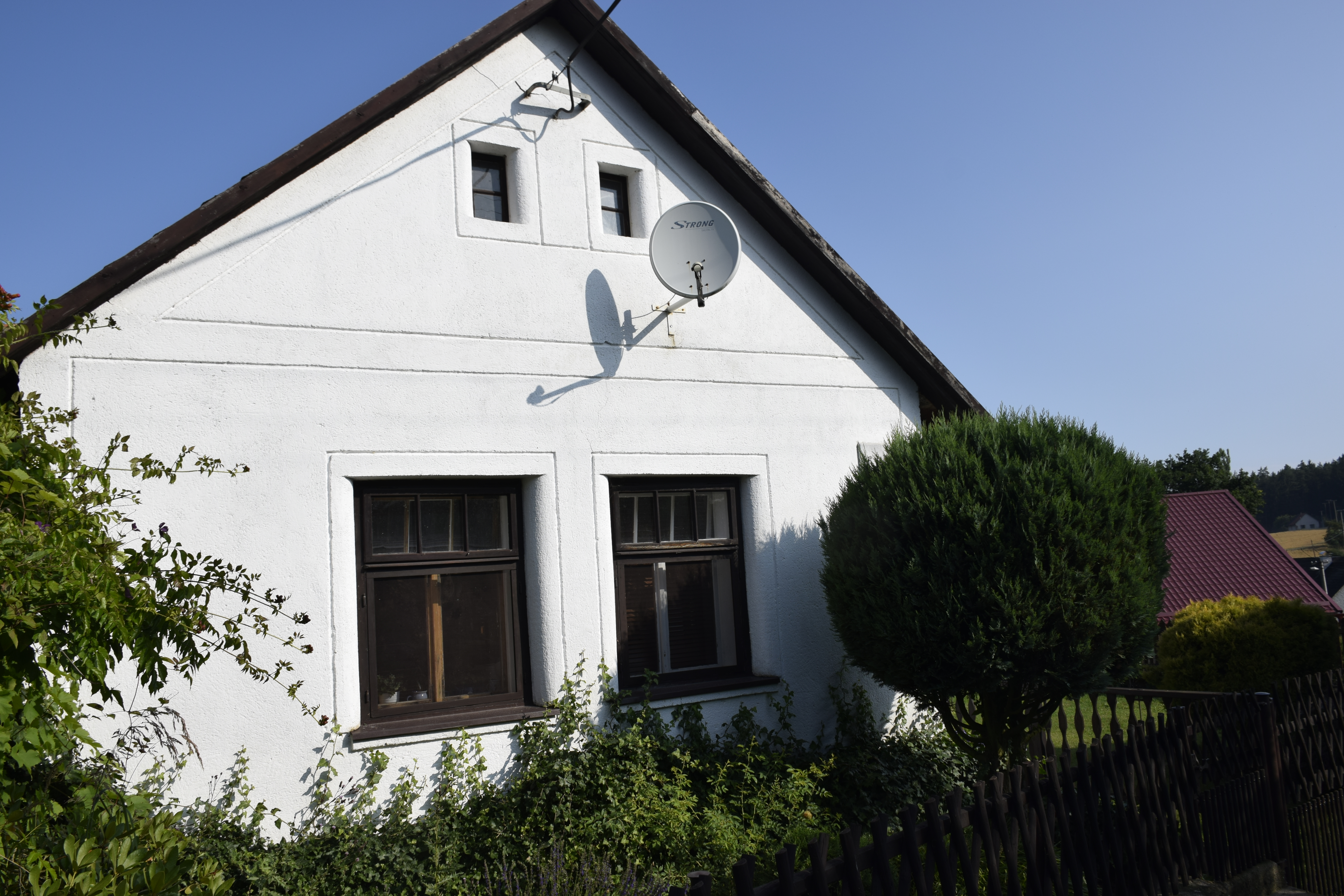 Onšovice (Radošovice). Česká republika.